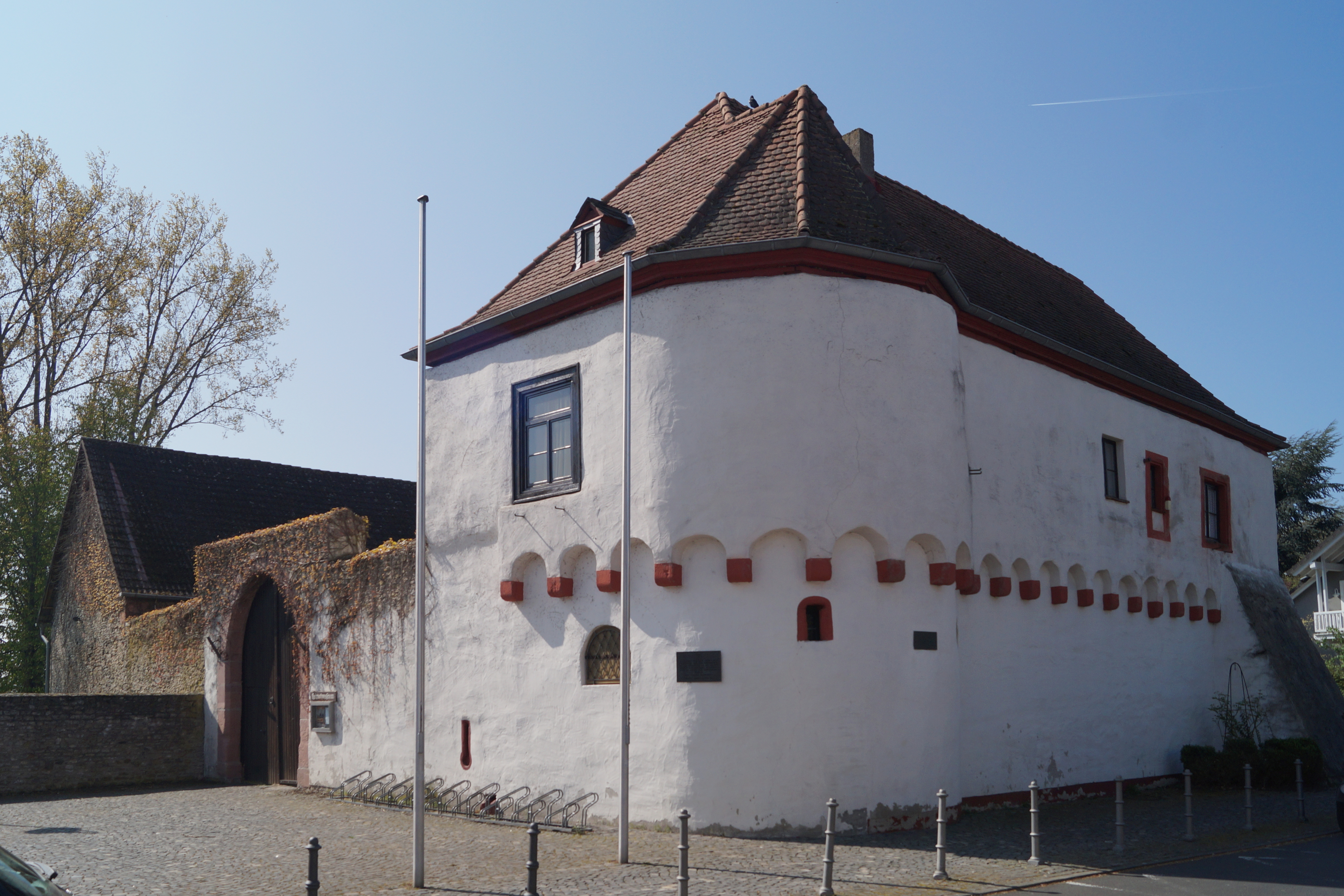 Wasserburg Rückingen, Ansicht von NO.